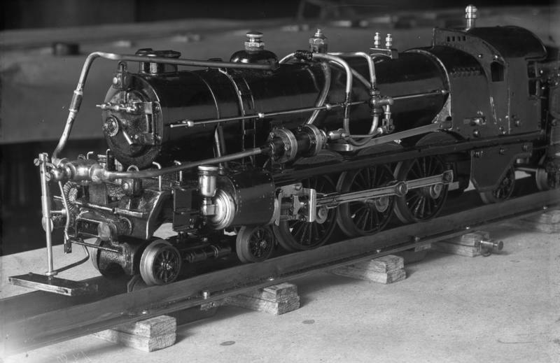 Keine Zugunglücke mehr! Dem deutschen Ing.Horz ist es gelungen, eine Erfindung zu machen, welche es ermöglicht, auf Grund magnetischer Kräfte Züge beim Ueberfahren des Haltesignals sofort zum Stehen zu bringen. Bei geschossenem Signal tritt die magnetische Signalvorrichtung, welche sich vorn an der Lokomotive befindet in Tätigkeit und bringt einen Zug, welcher sich im 90 km.-Tempo befindet, innerhalb 100 m zum Stehen. Nur wenn das Signal auf Fahrt freigegeben wird, ist es dem Lokomotivführer möglich, den Zug weiterfahren zu lassen. Die neue D'-Zug-Lokomotive der Zukunft. Vorn an der Lokomotive befindet sich der Magnet. Beim Anziehen des Magneten auf die Eisenbahnschienen schliessen sich die Dampfventile von selbst und bringen den Zug bei 90 km. Fahrtgeschwindigkeit auf einer strecke von 100 m zum Stehen.